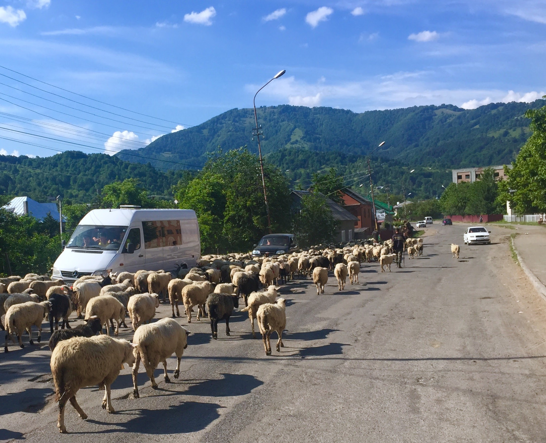 Проводи вівчарів на полонину відбуваються один раз в році на початку травня